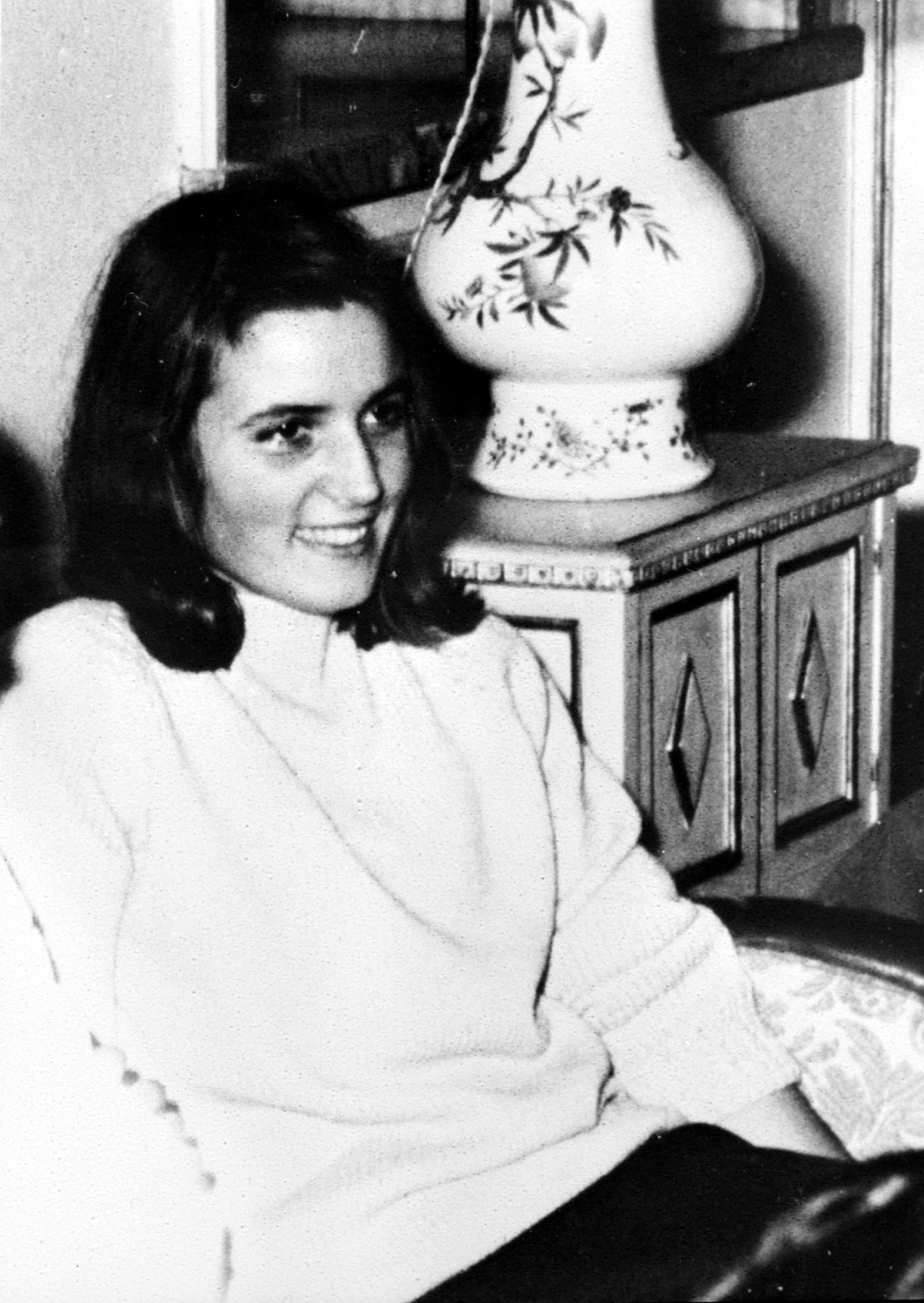 Montserrat Grases García